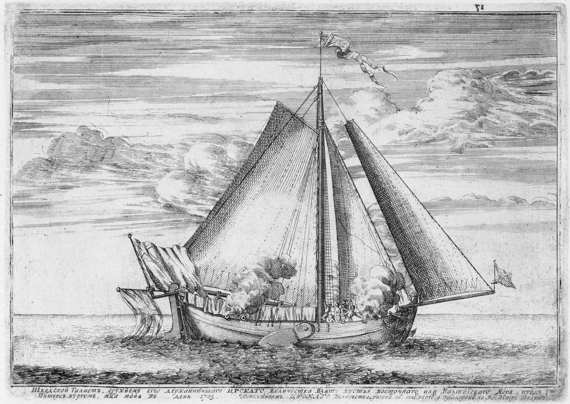 Галиот Гедан, захваченный русскими войсками в мае 1703 года. Данное изображение было использовано в статье «Астрильд» опубликованной в третьем томе «Военной энциклопедии», который был издан книгоиздательским товариществом Ивана Дмитриевича Сытина в 1911 году в столице Российской империи городе Санкт-Петербурге.